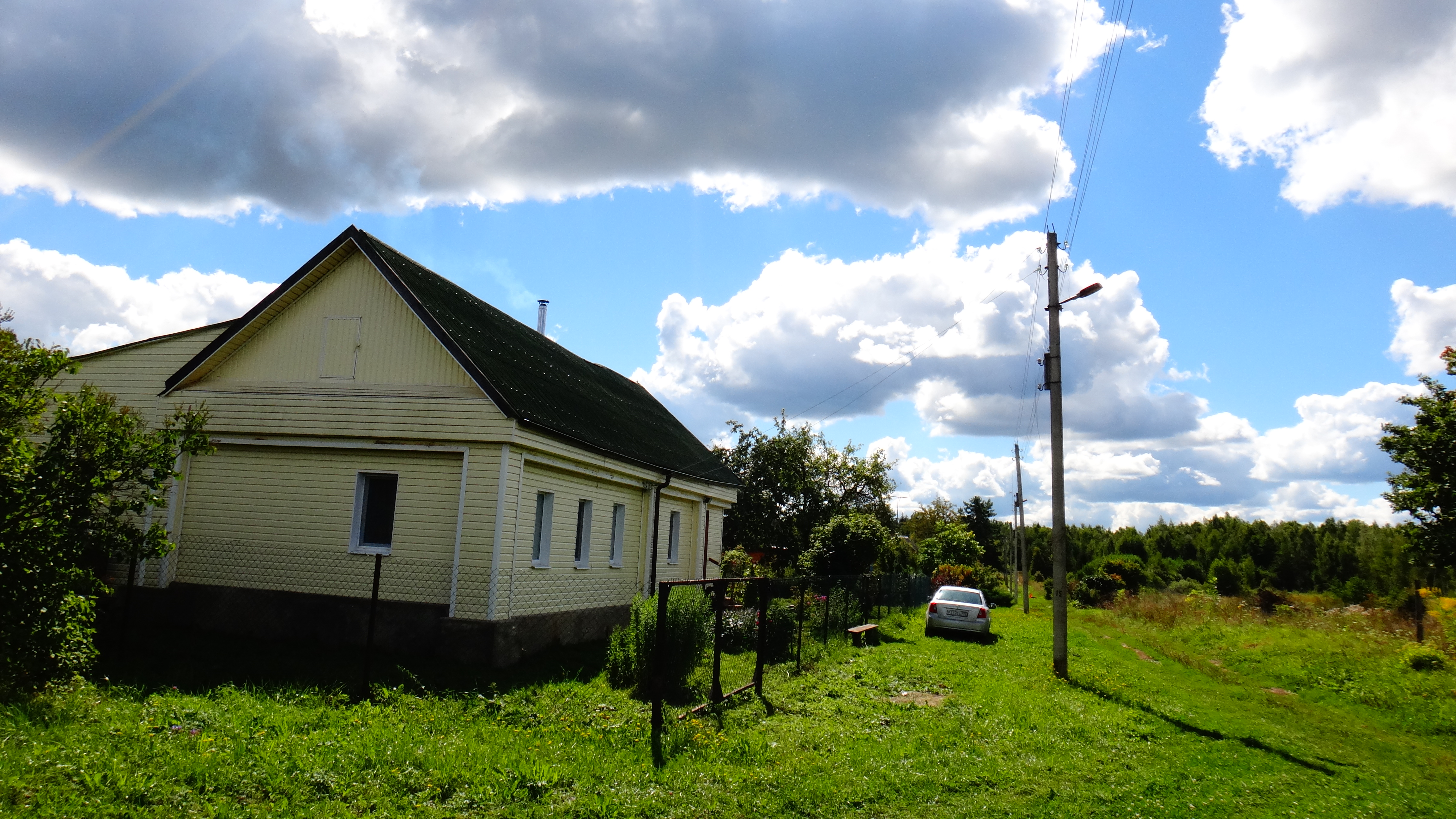 Myatlevo, Kaluzhskaya oblast', Russia, 249875